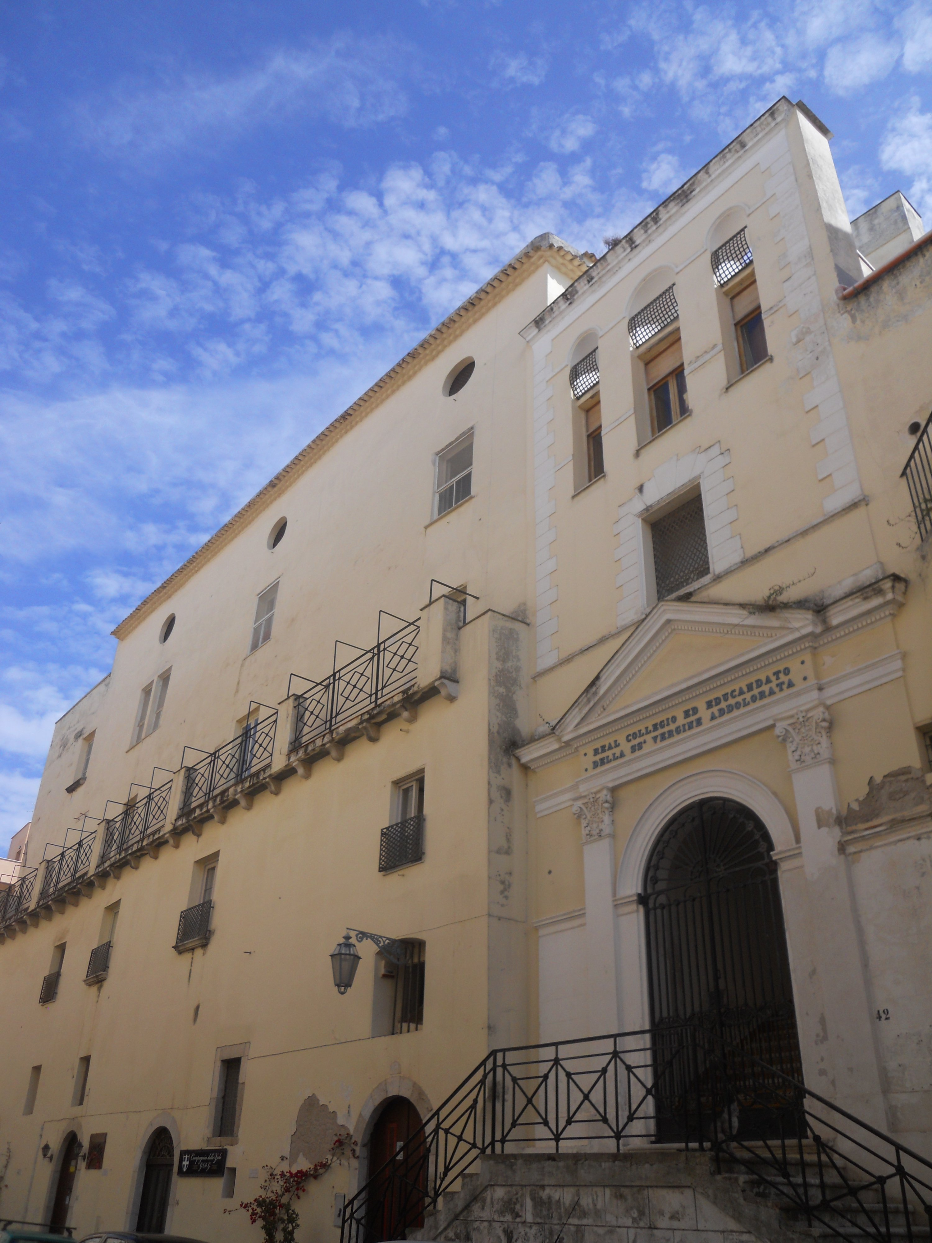 La facciata della chiesa della Santissima Addolorata a Gaeta e l'annesso convento